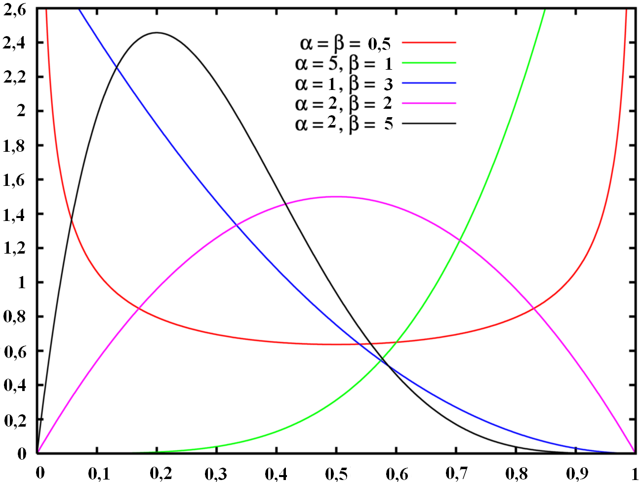 Funkcija verjetnostnosti porazdelitve beta.